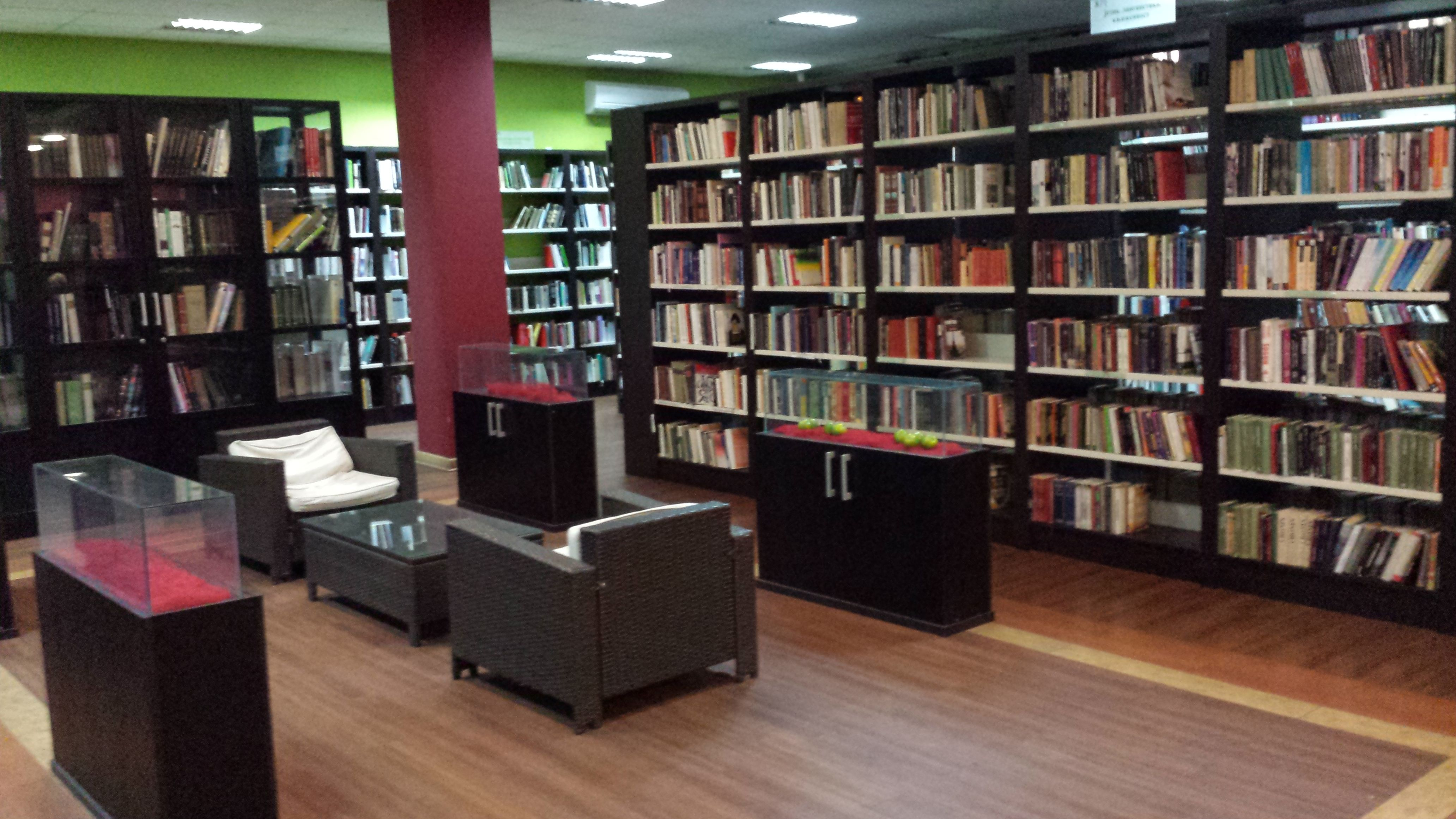 Biblioteka "Petar Kočić" na Vračaru